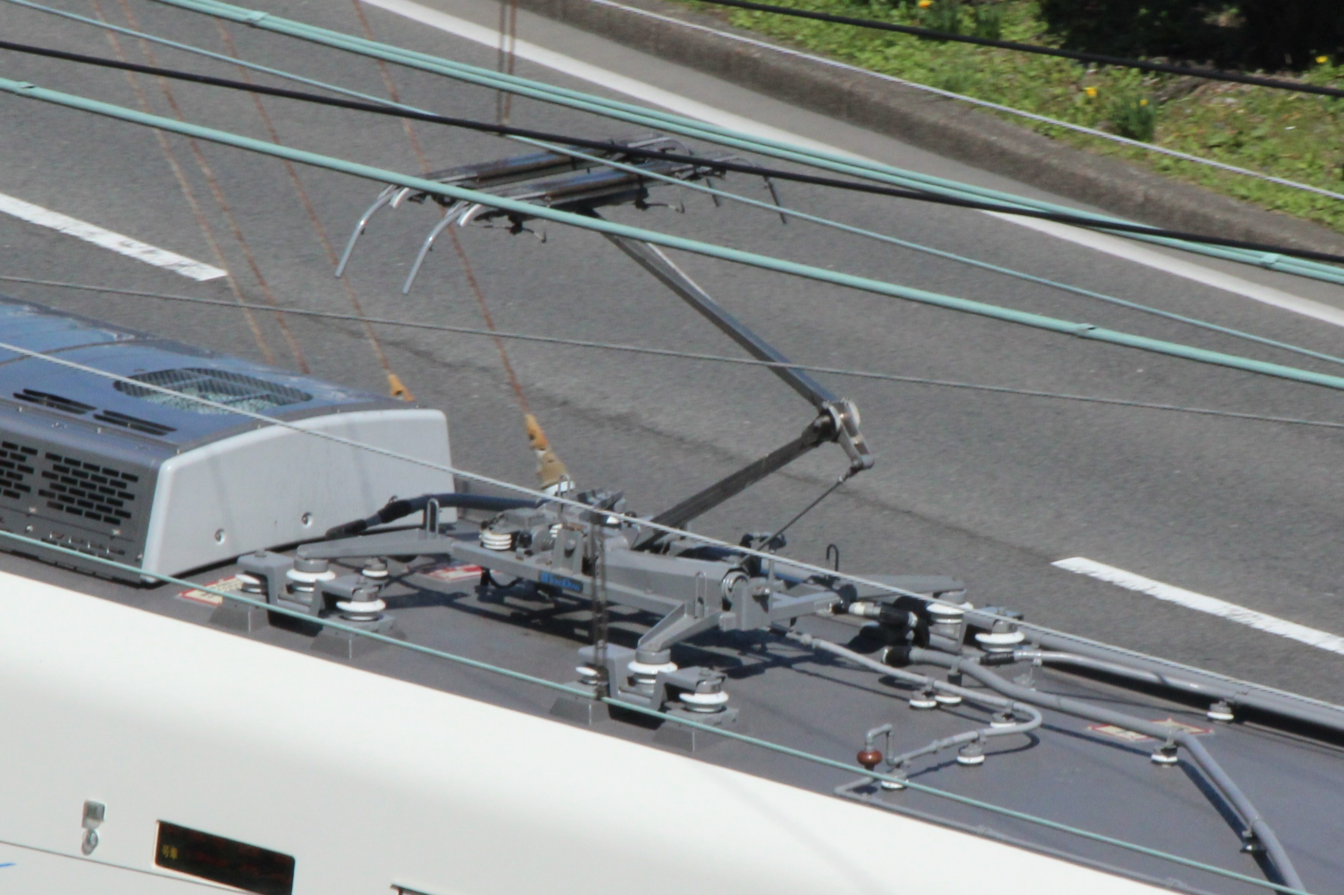 近鉄50000系パンタグラフPT-7126A